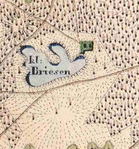 Briesen, Gem. Gerswalde, Lkr. Uckermark, Brandenburg, Ausschnitt aus dem Urmesstischblatt 2848 Gerswalde von 1826